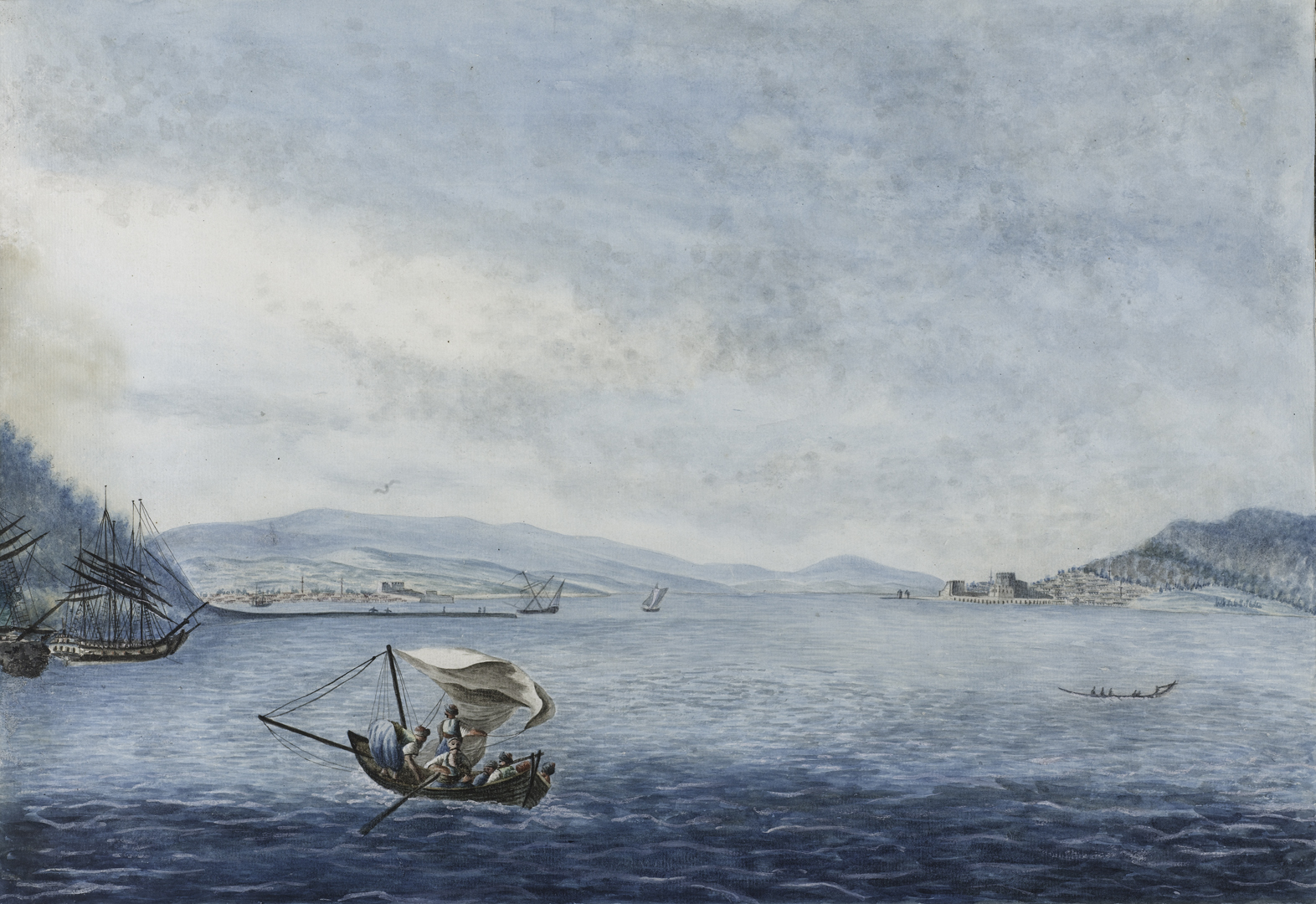 Çanakkale –Abydos Burnu.Istanbul Boğazı’na giriş Clara Barthold Mayer, 43,5 x 57,5 cm, 18. yüzyıl sonları